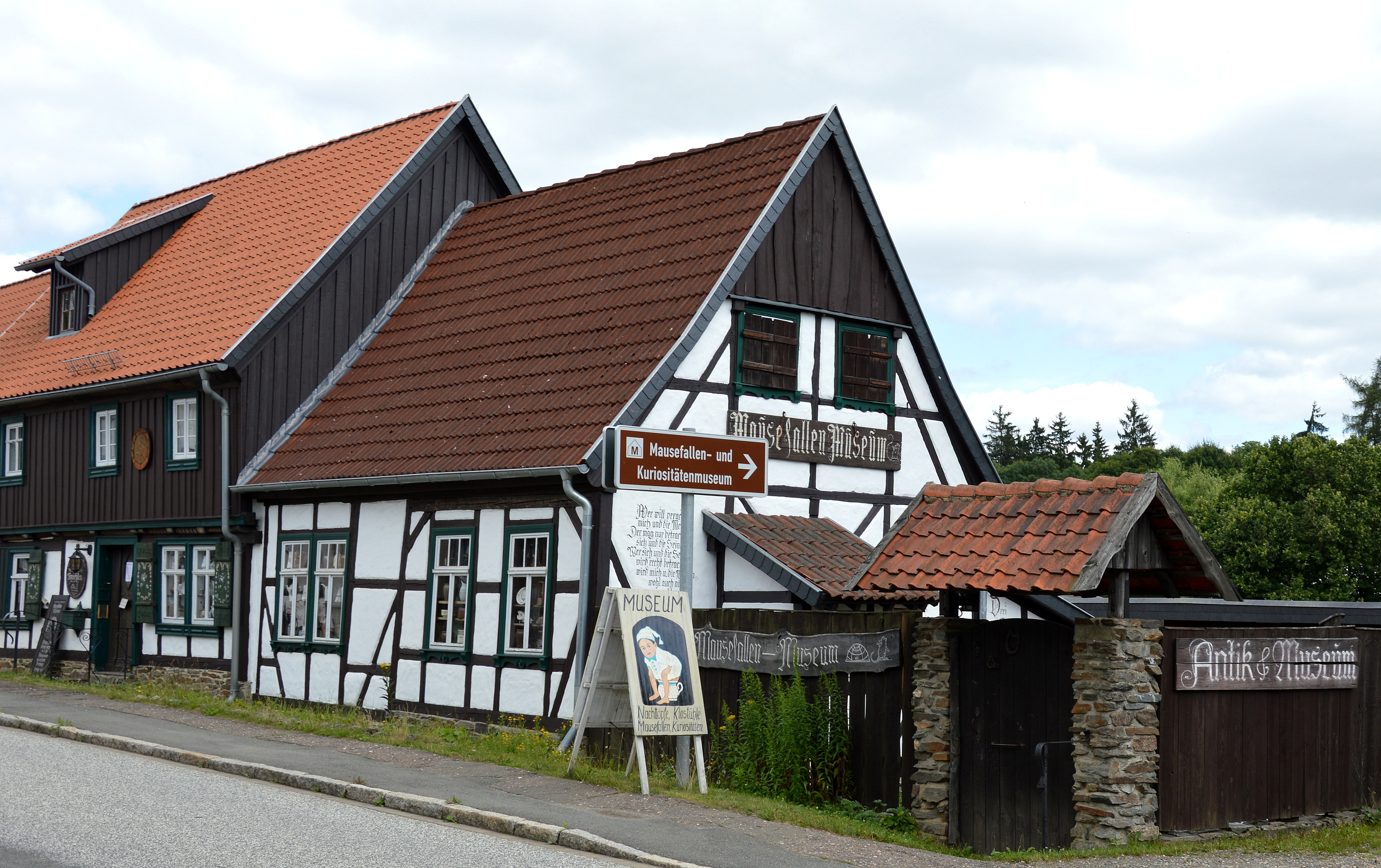 Mausefallenmuseum Güntersberge